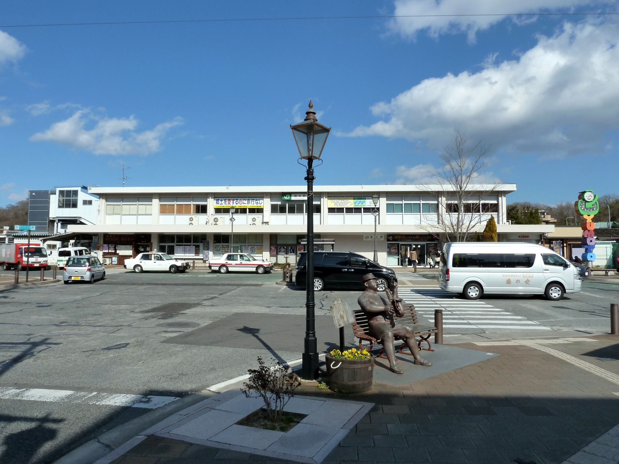 JR東日本常磐線 湯本駅